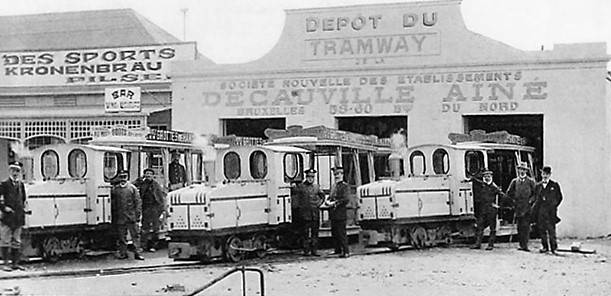 Decauville Tramway at Exposition Universelle in Gent, 1913